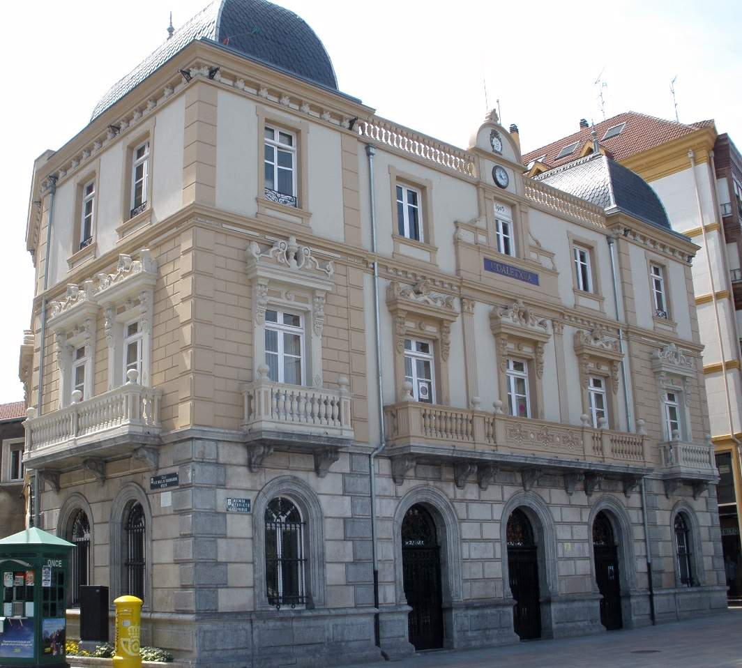 Ayuntamiento de Santurce (Bizkaia)